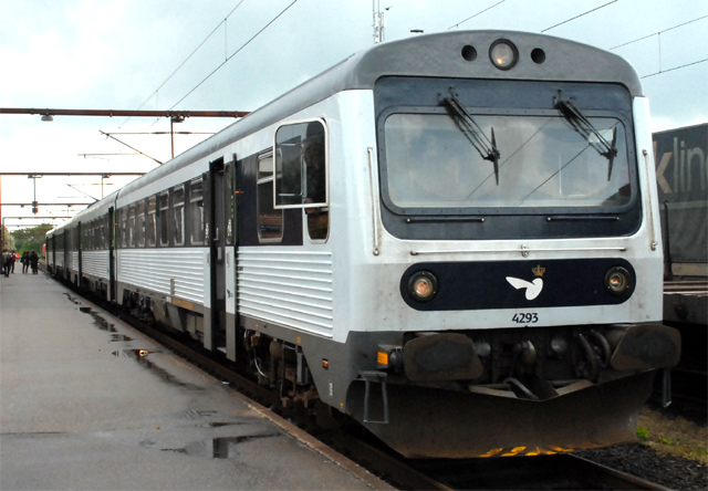 Danske Statsbaner (DSB) trein MRD/MR 4293/4093 te Padborg als stoptrein naar Fredericia.